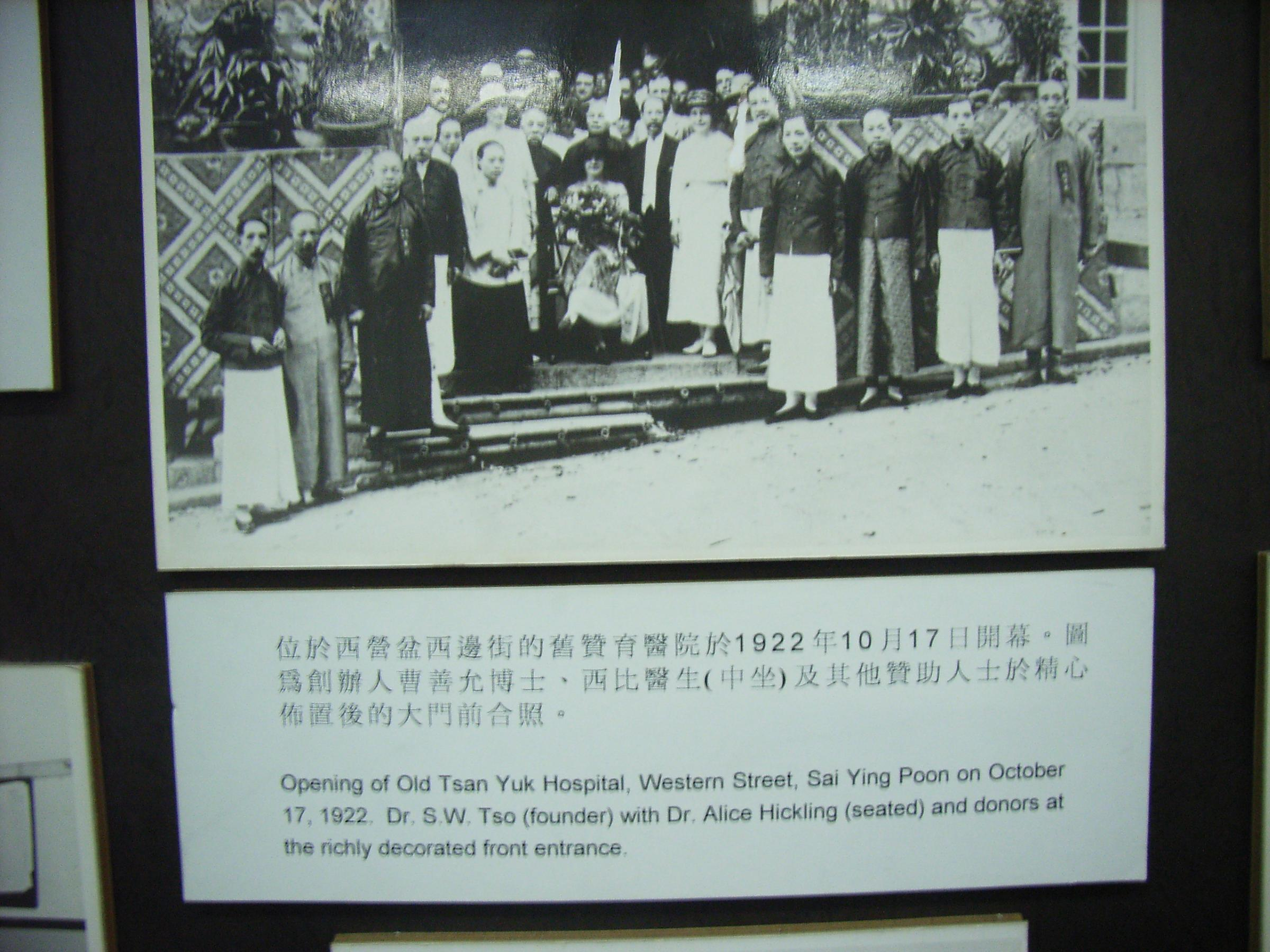 香港zh:公共醫療zh:歷史之zh:贊育醫院